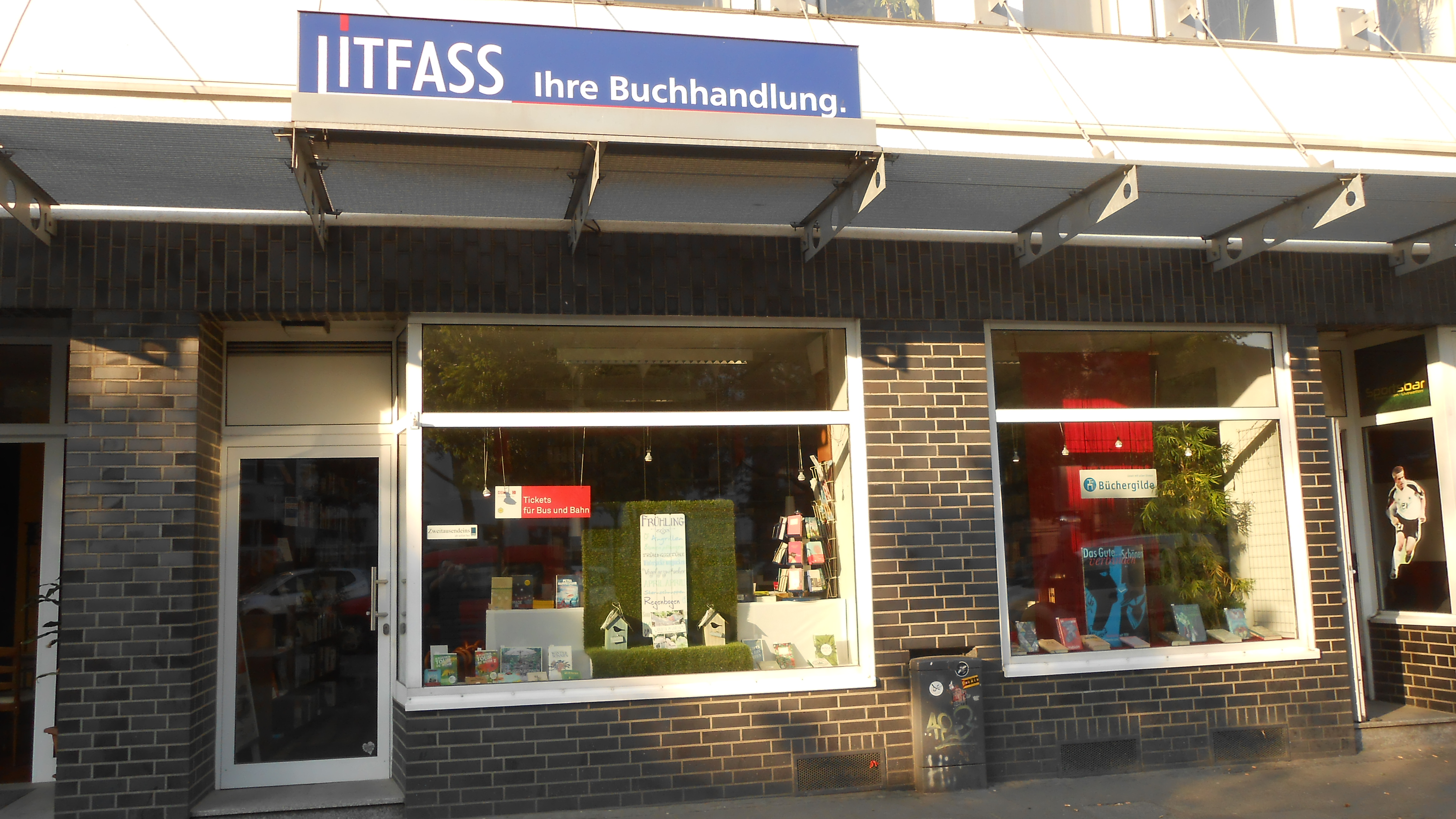 Die Buchhandlung Litfass an der Münsterstraße, Partnerbuchhandlung der Büchergilde Gutenberg in Dortmund.